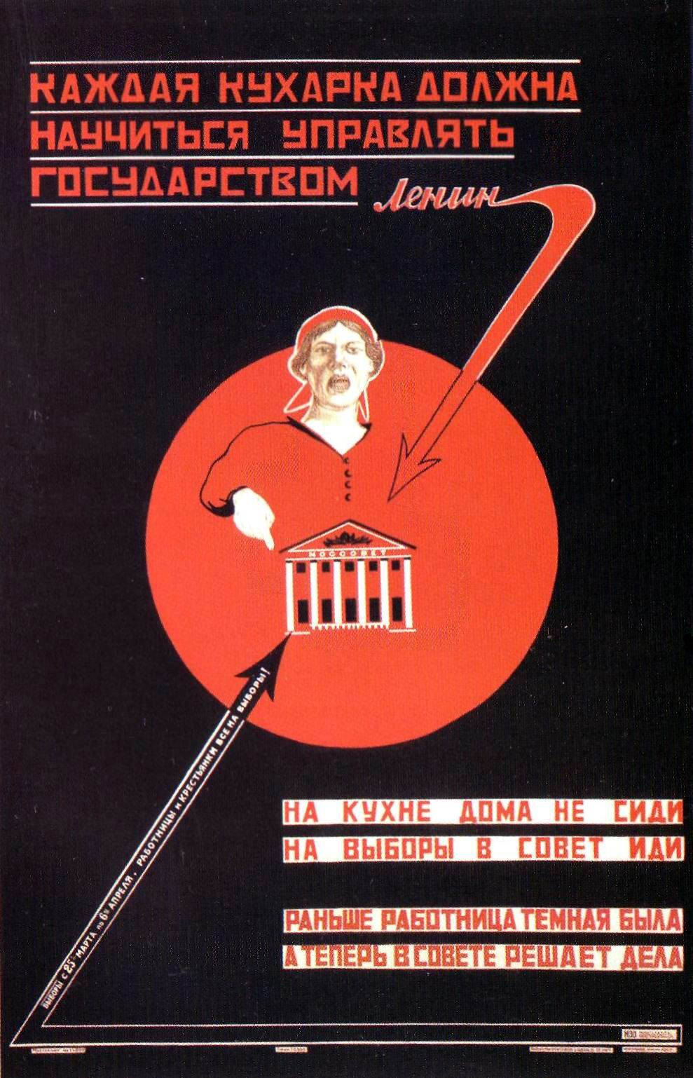 "Ogni cuoca dovrebbe imparare a governare lo Stato" (frase di Lenin)